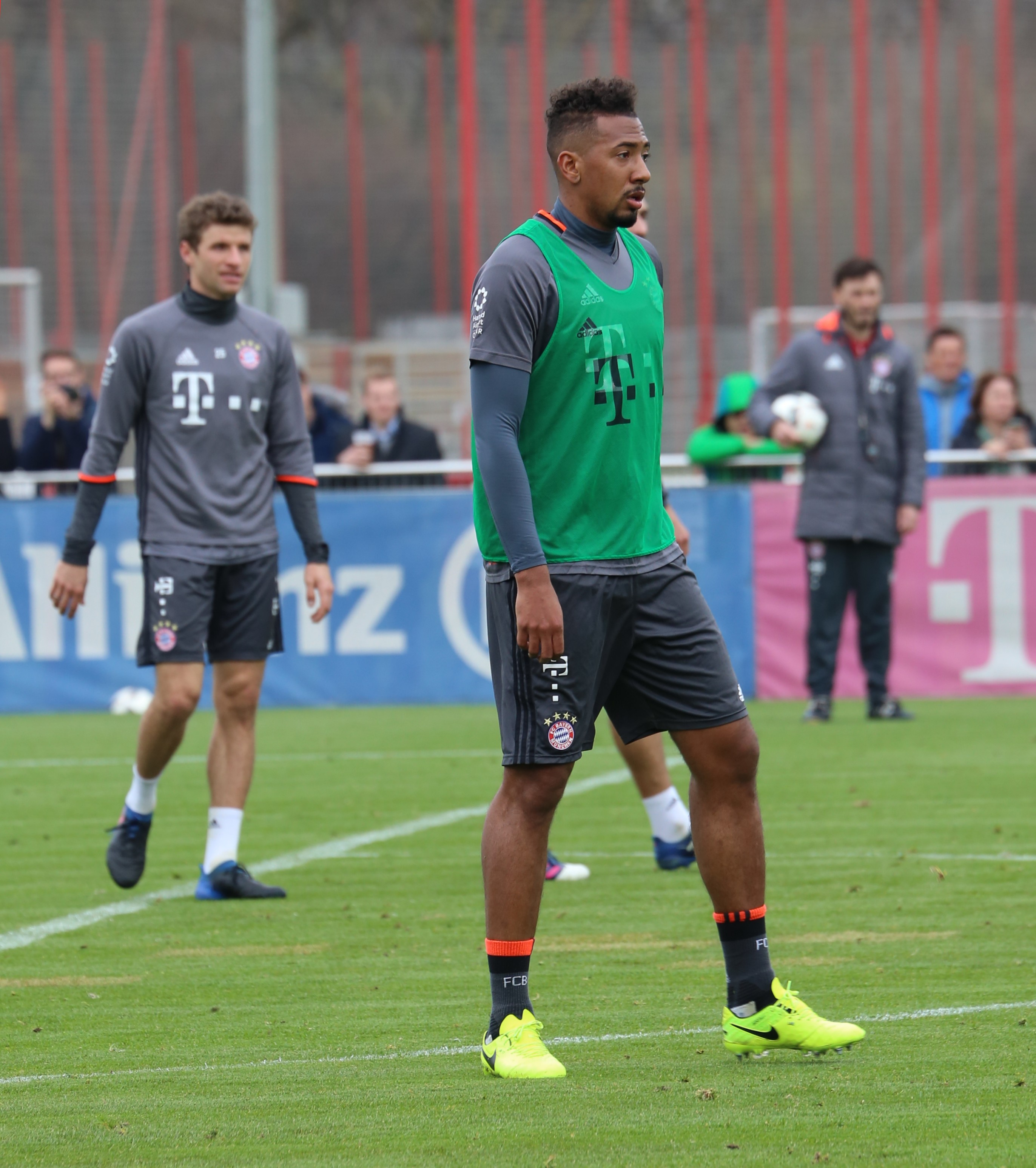 Jérôme Boateng, am 14. März 2017 beim Training auf dem Gelände des FC Bayern München